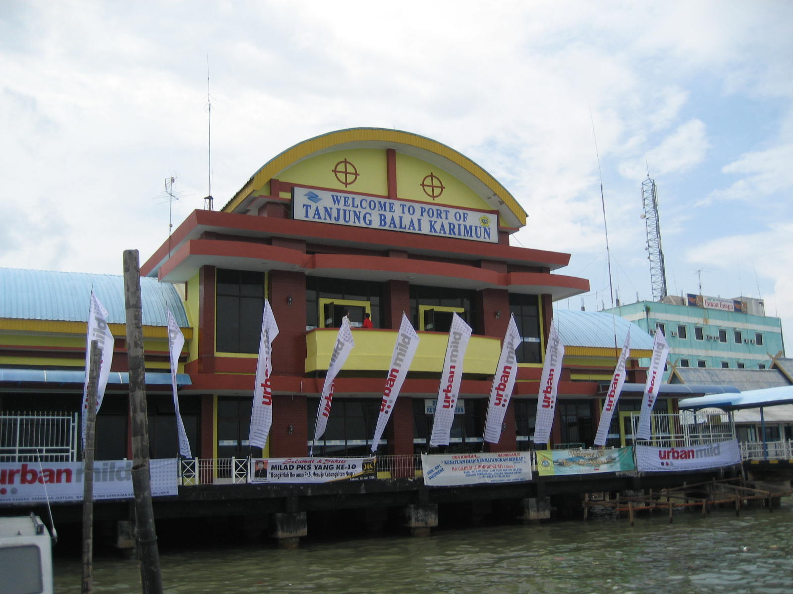 Tanjung Balai port, Karimun island, Indonesia